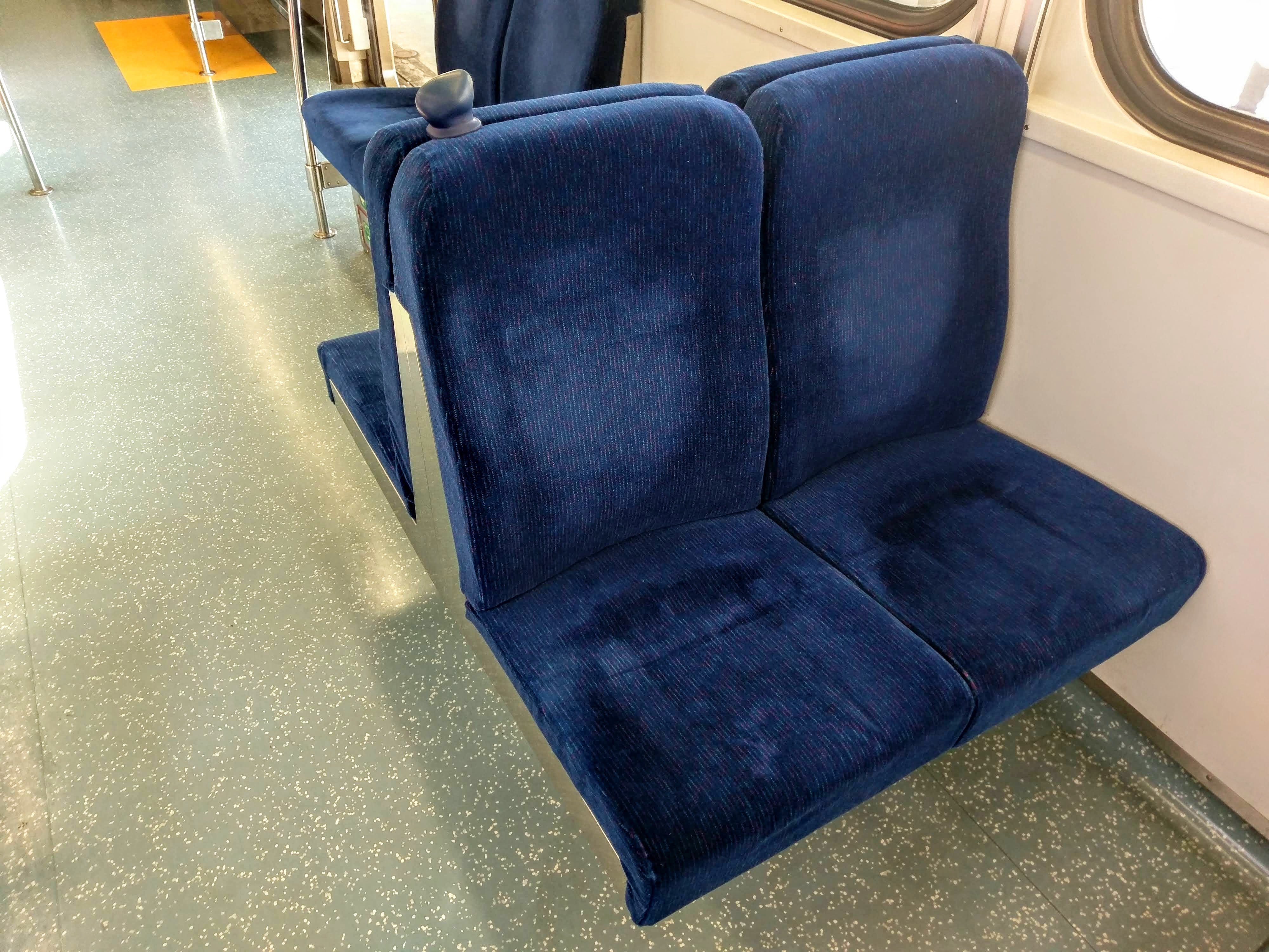 中文（台灣）: 台鐵EMU800型電聯車的車內座椅